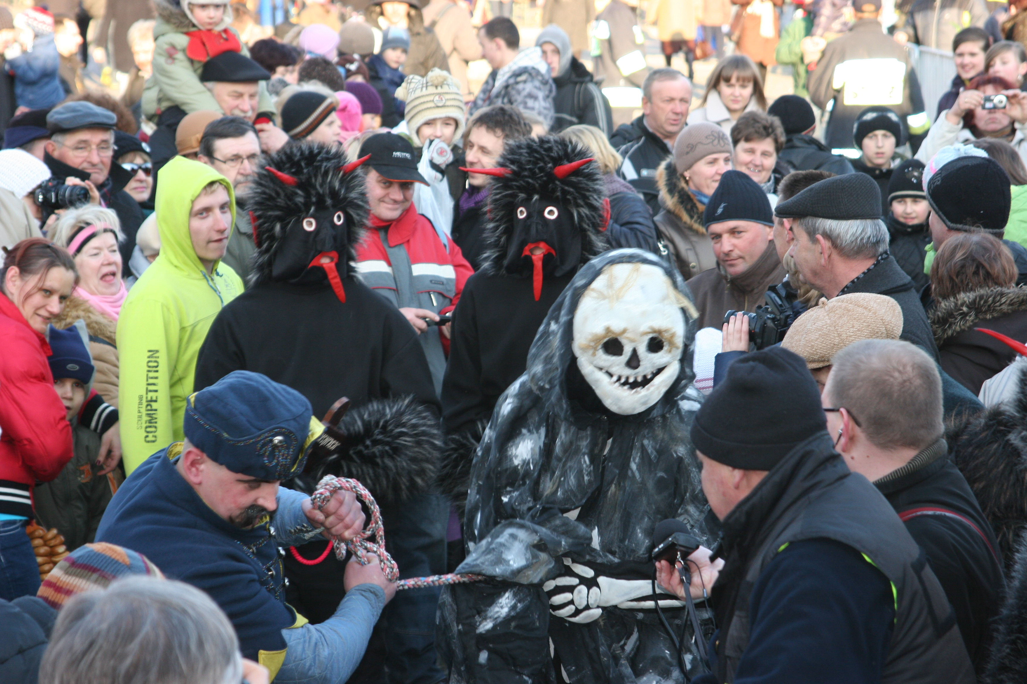 Prowadzenie śmierci na ścięcie